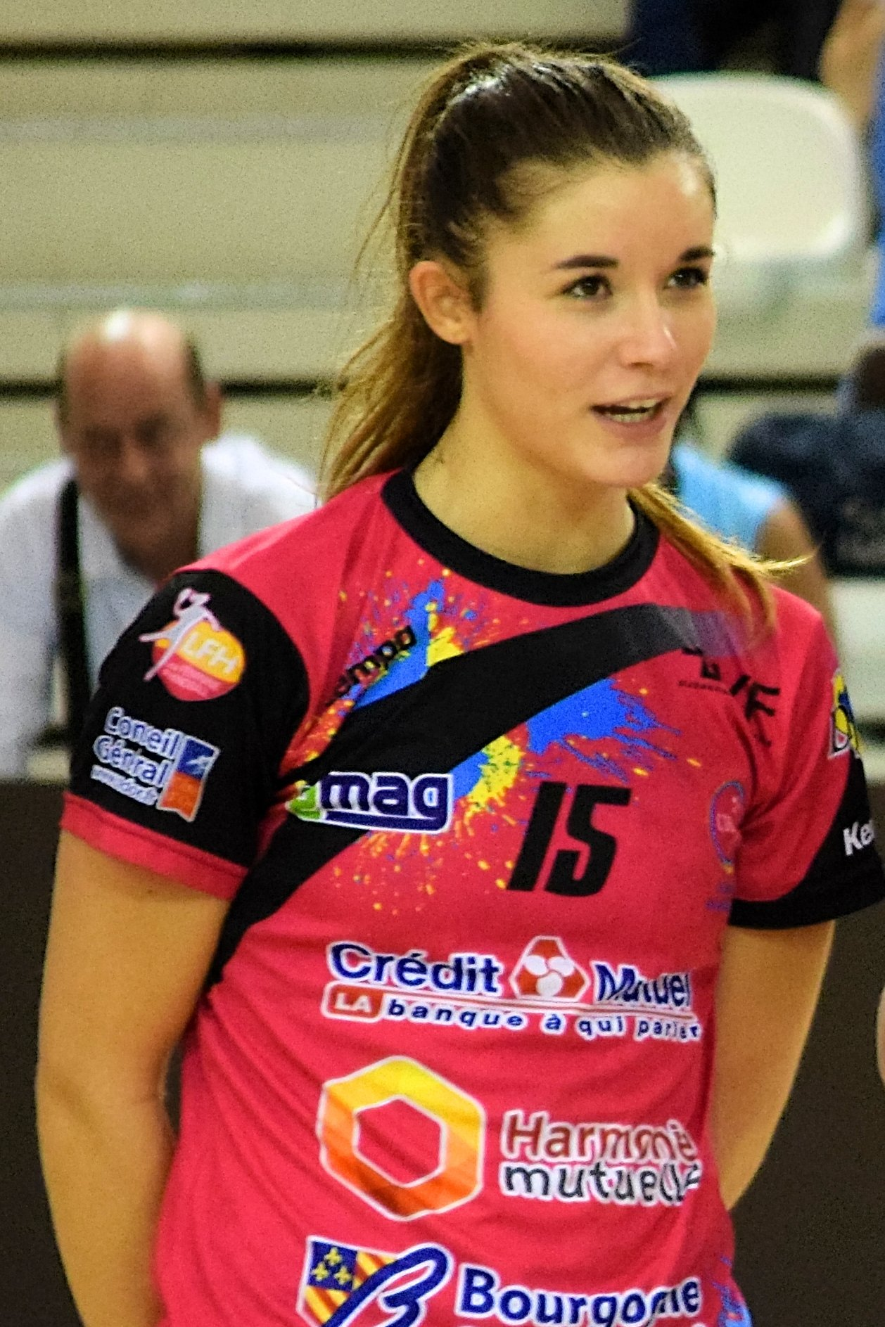 Marie François, demi-centre du club de handball Cercle Dijon Bourgogne. Le 19 octobre 2014 lors du match de la 10e journée de championnat féminin, Issy Paris Hand / Cercle Dijon bourgogne.